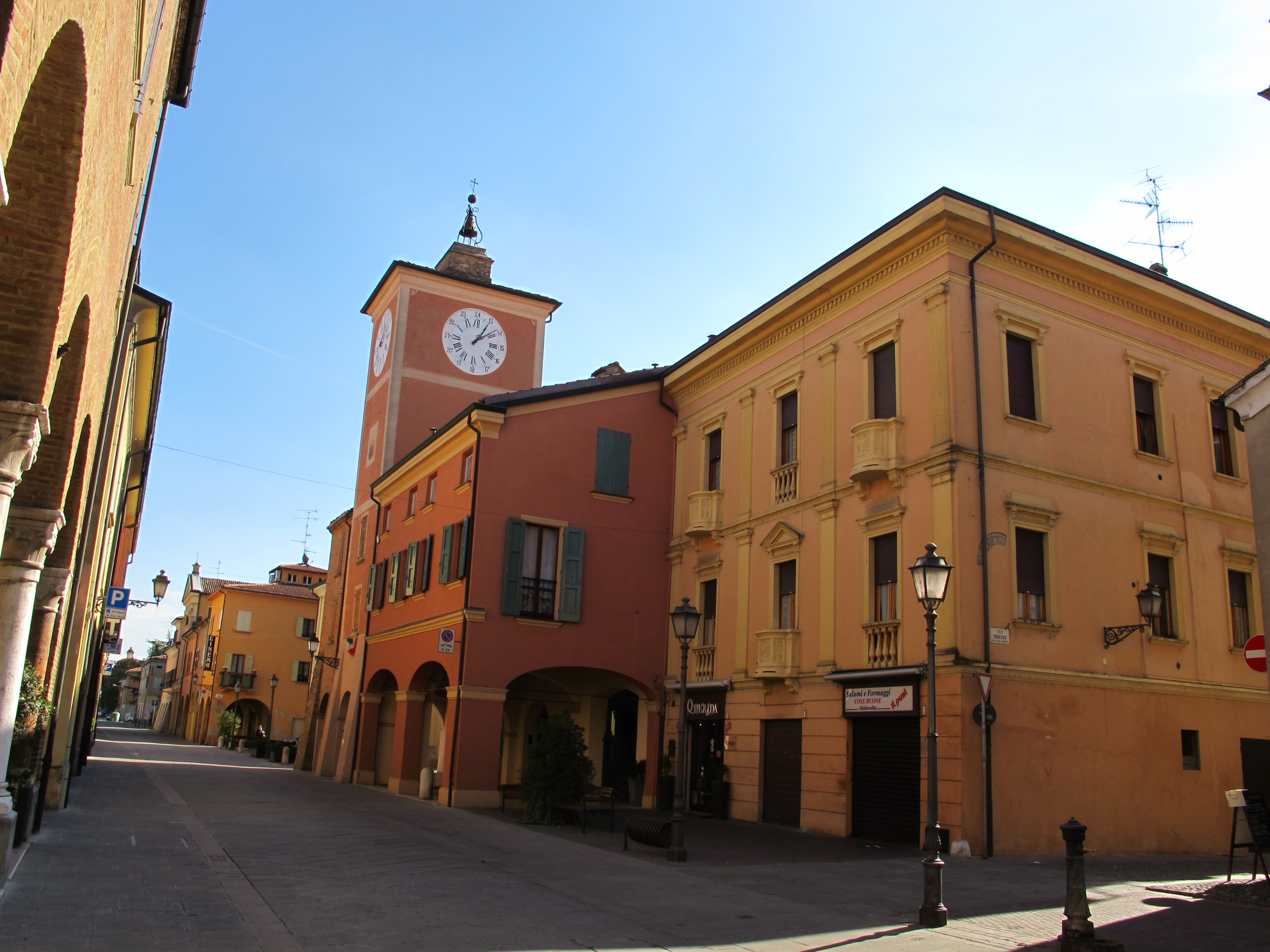 Rubiera, torre dell'orologio